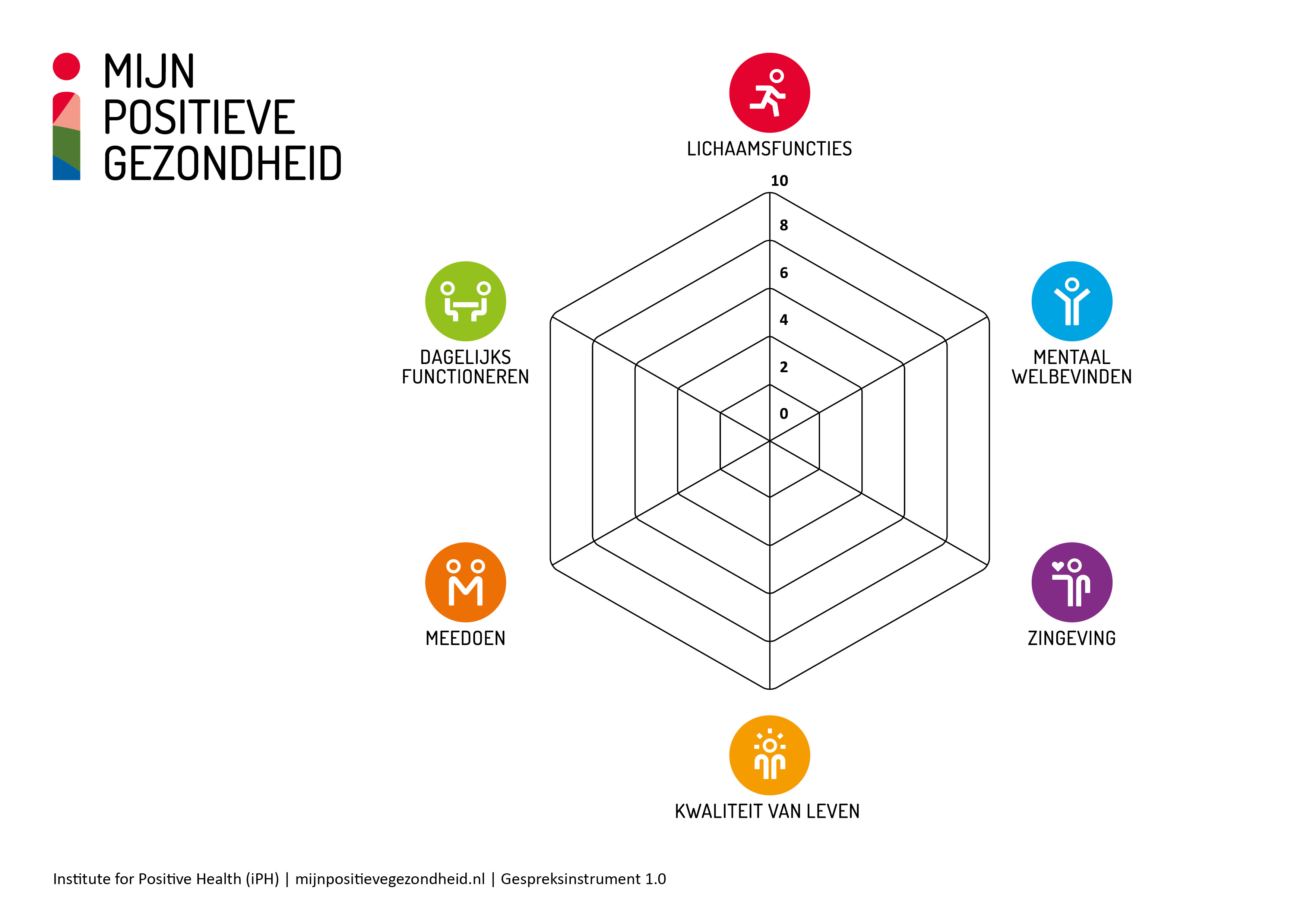 Positieve Gezondheid gespreksinstrument ontwikkeld door iPH